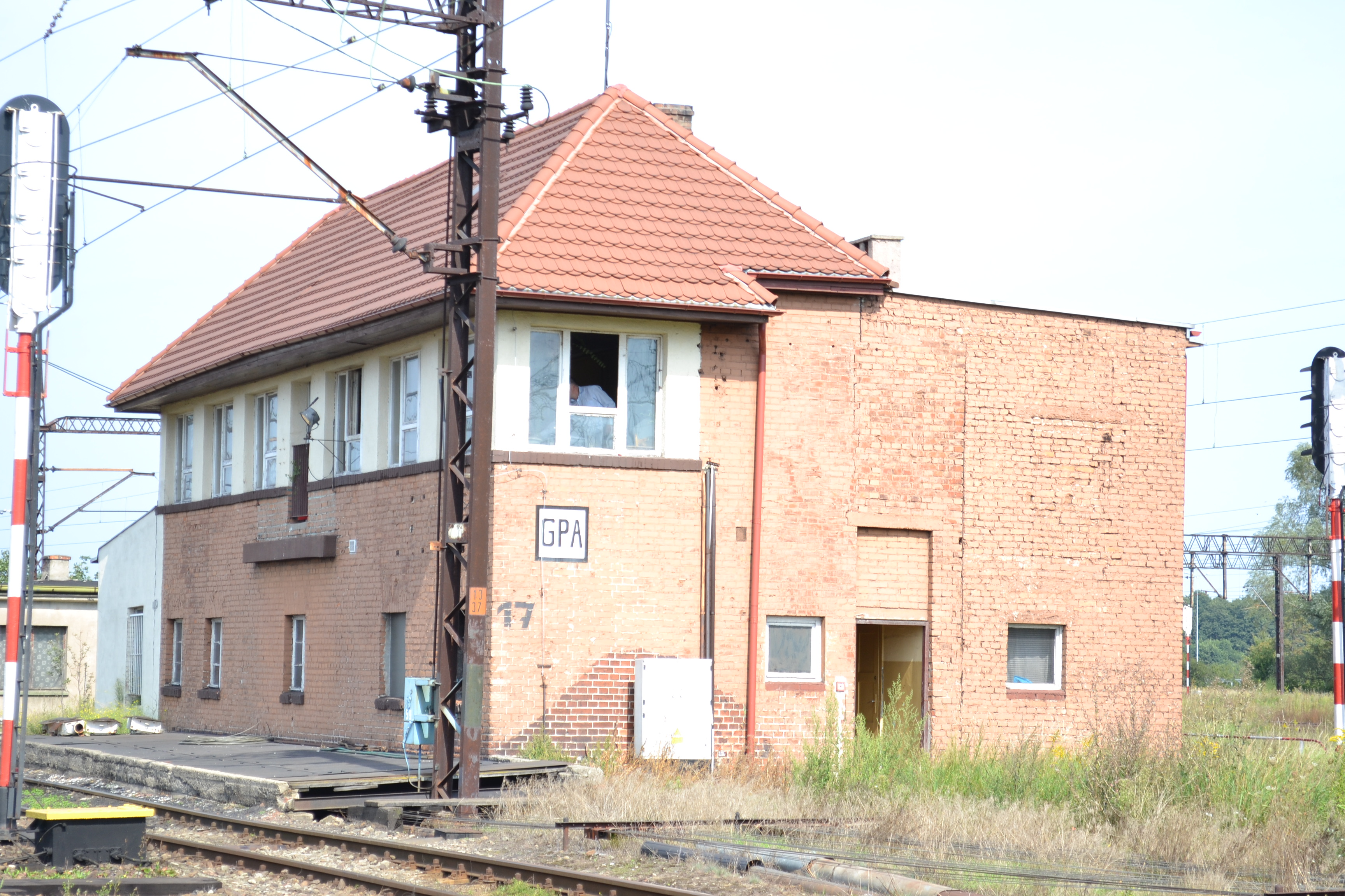 nastawnia GPA w Gdańsku Porcie Północnym